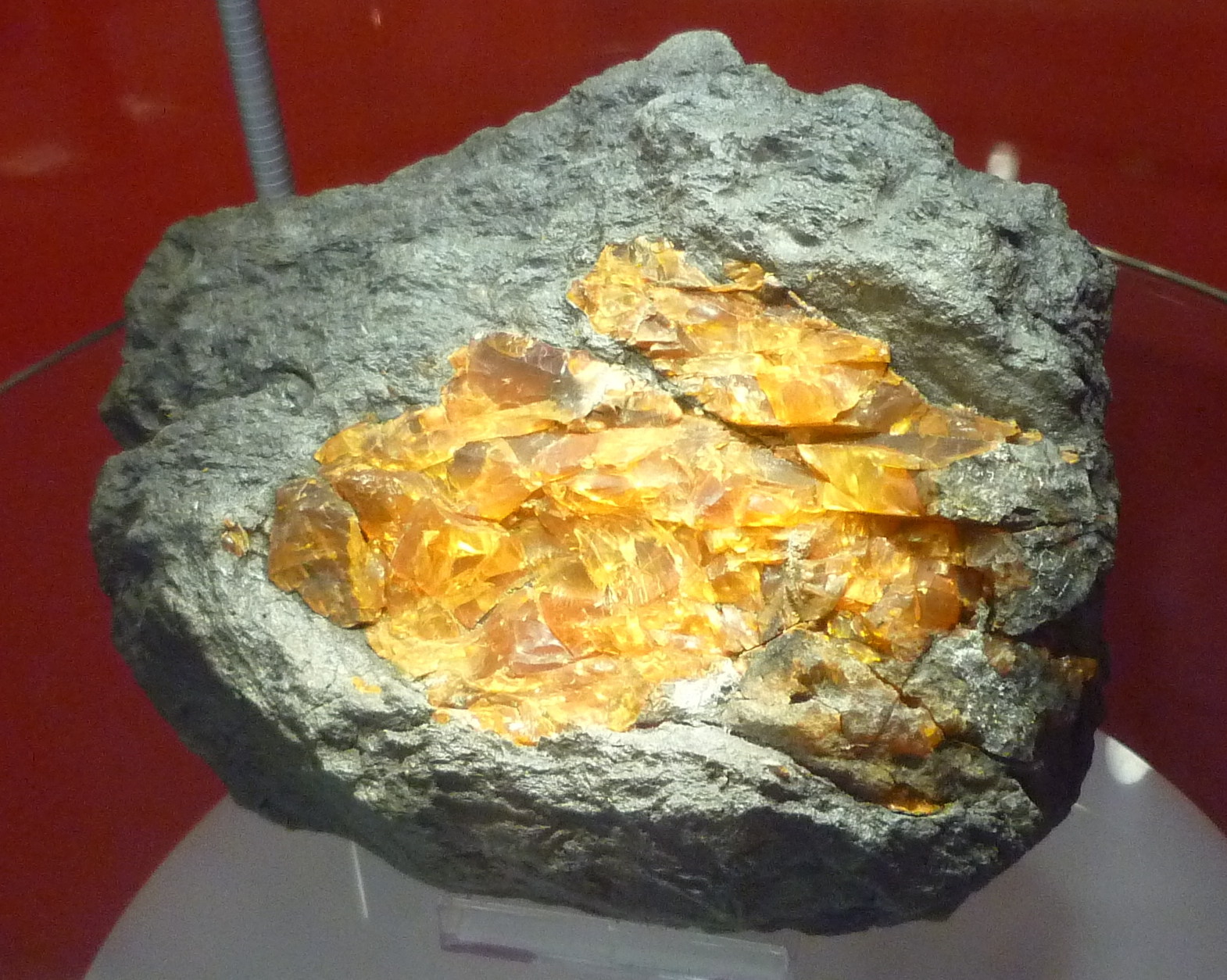 Muestra de ámbar - Yacimiento de Rábago/El Soplao. Exposición en Cueva El Soplao, Cantabria, España.